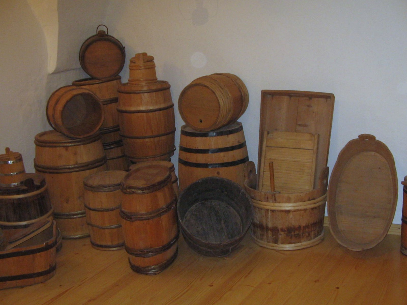 Museum Železniki, Slovenia